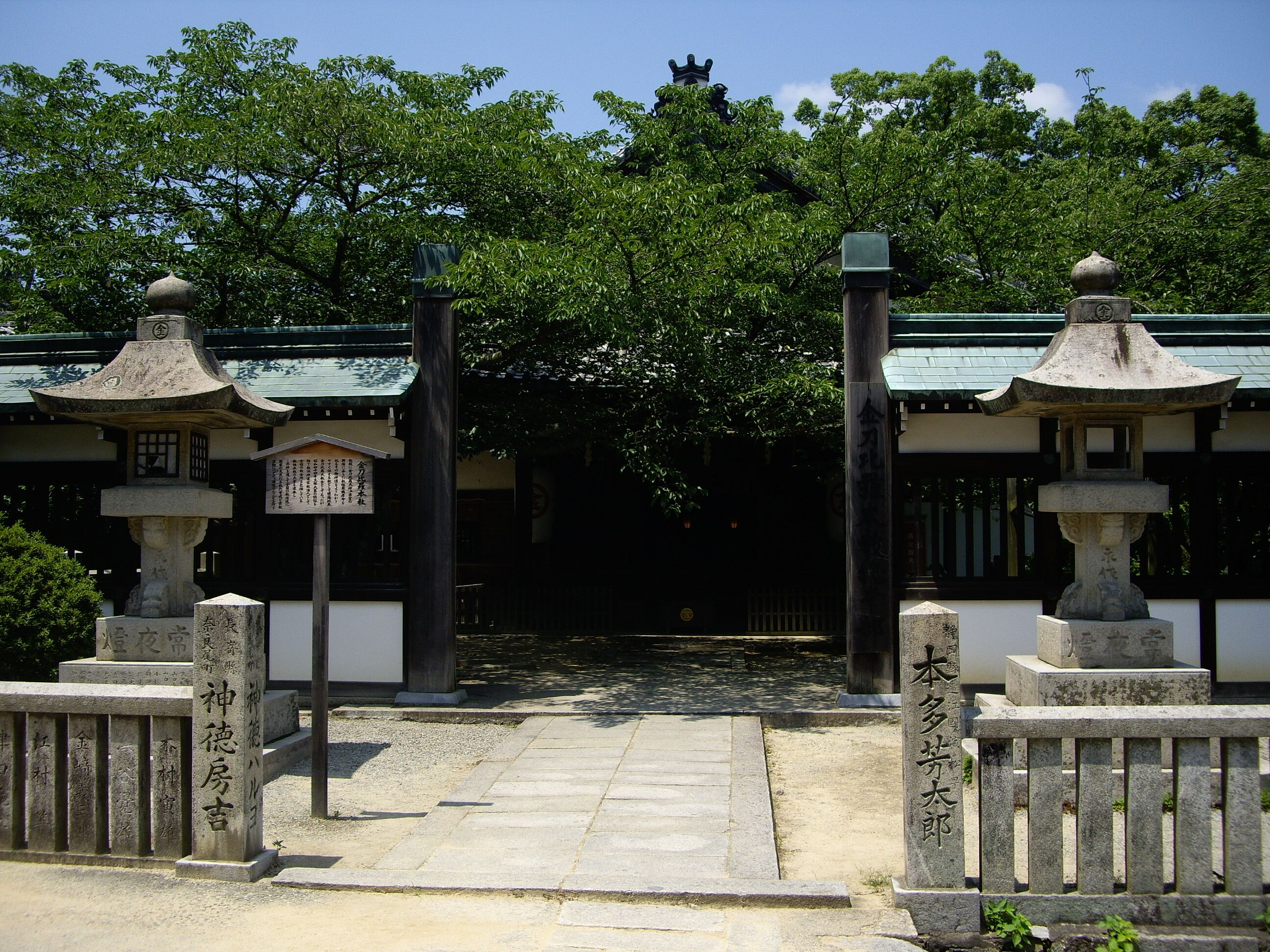 金刀比羅本教総本部 - 金刀比羅宮（香川県琴平町）の参道脇。